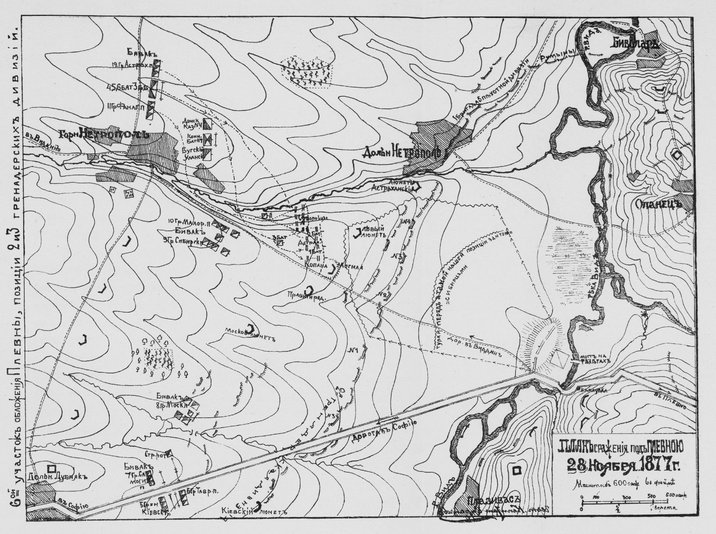 11-ти Фанагорийски и 12-ти Астрахански полкове се включват в боя край Долна Митрополия